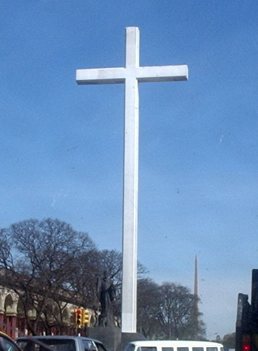 Cruz cristiana, símbolo religioso ubicado en el barrio montevideano de Tres Cruces, que señala el lugar en donde el Papa Juan Pablo II dio misa en su primera visita a Uruguay.